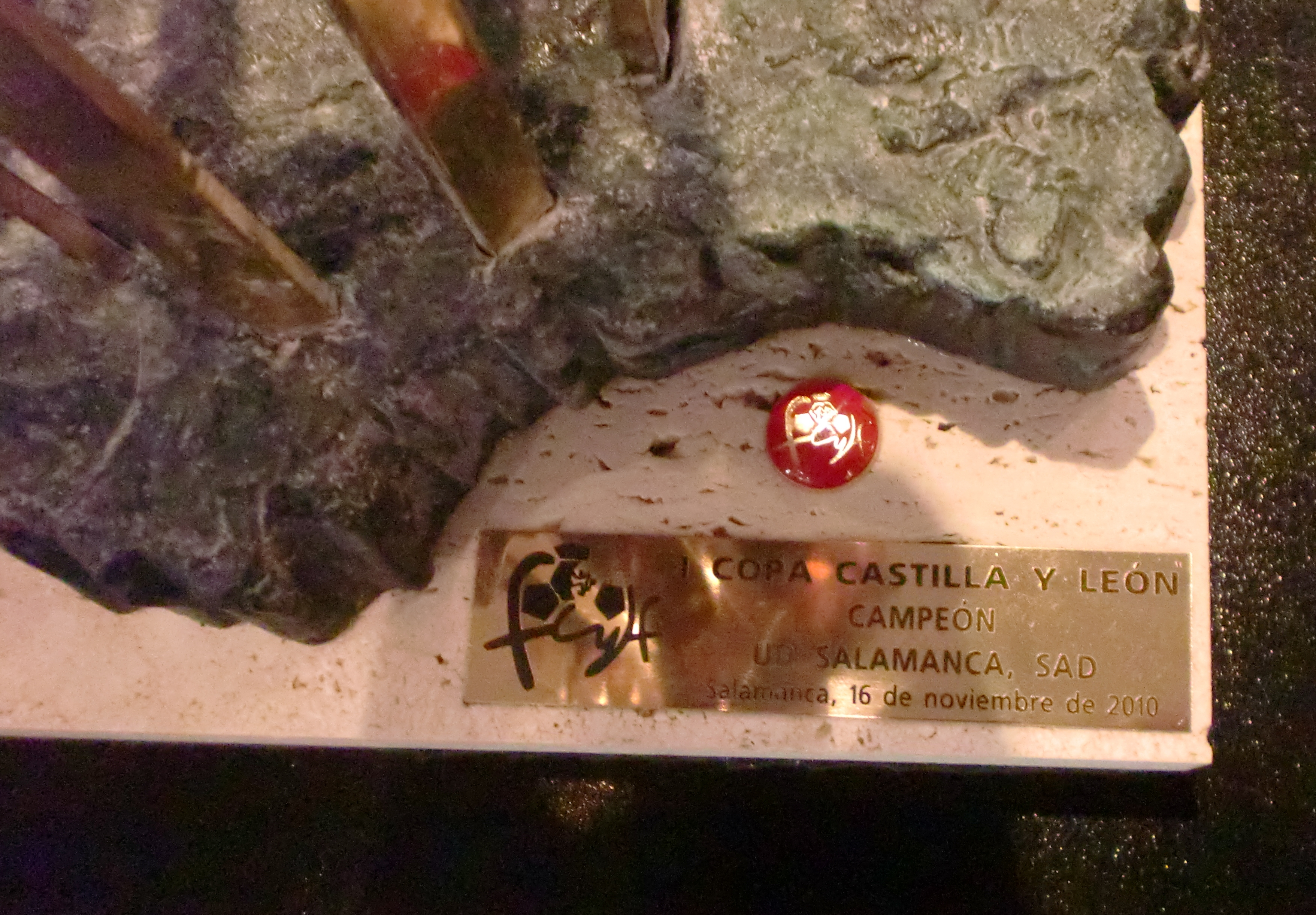 Copa CYL